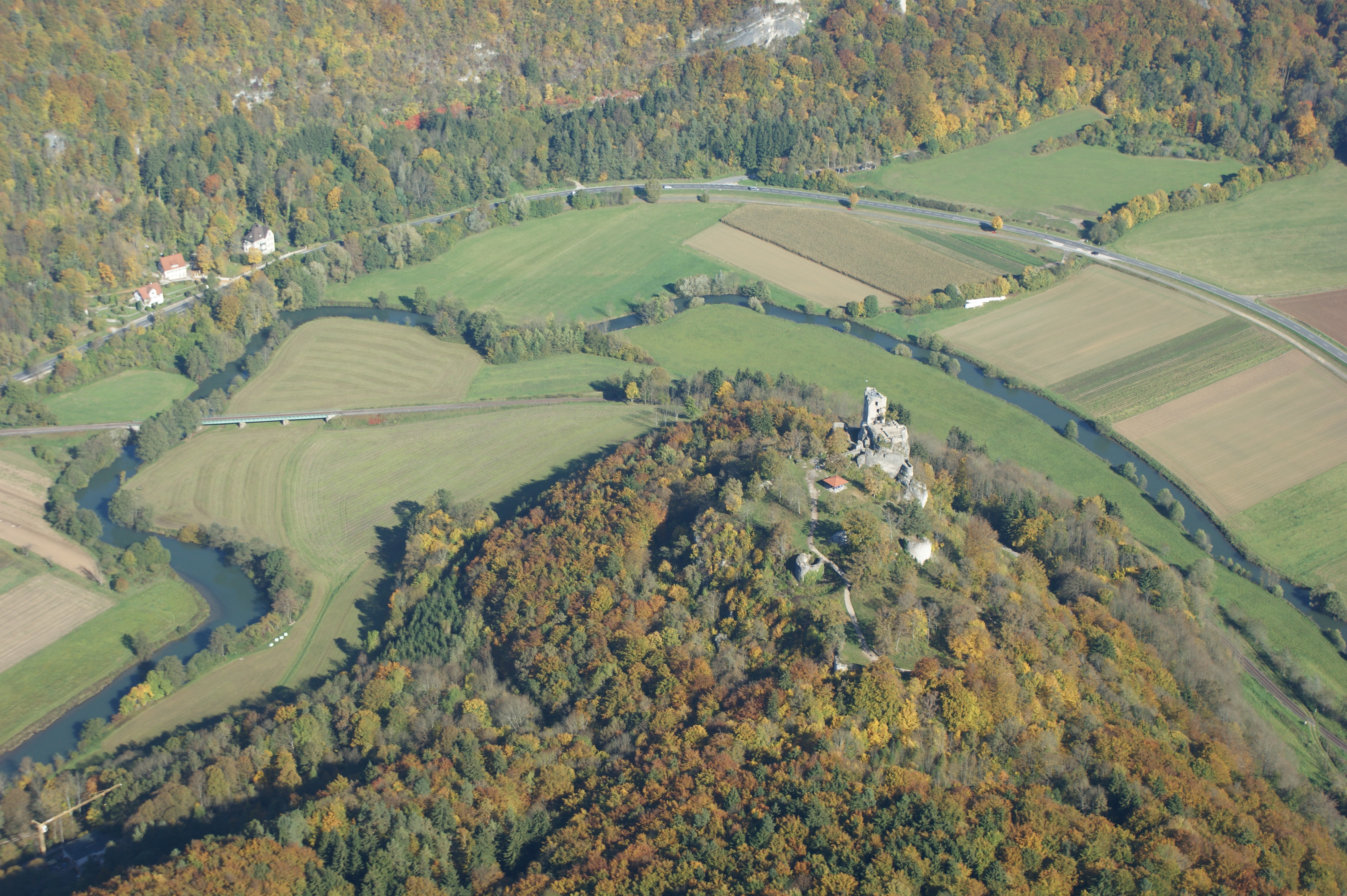 Burgruine Neideck im Herbst 2010